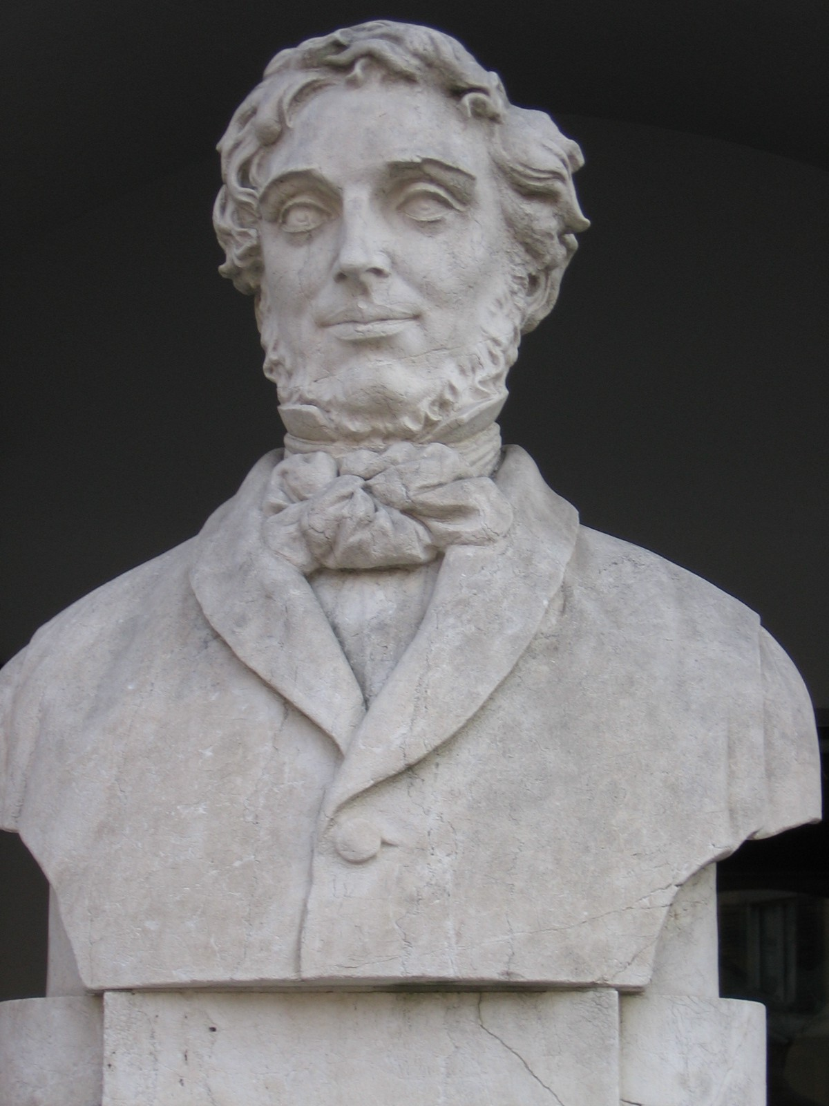 Busto di Pietro Ruggeri da Stabello, Bergamo.